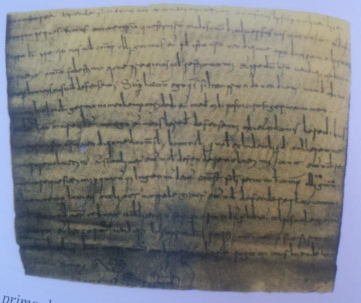 Primo documento di Casamassima del 962